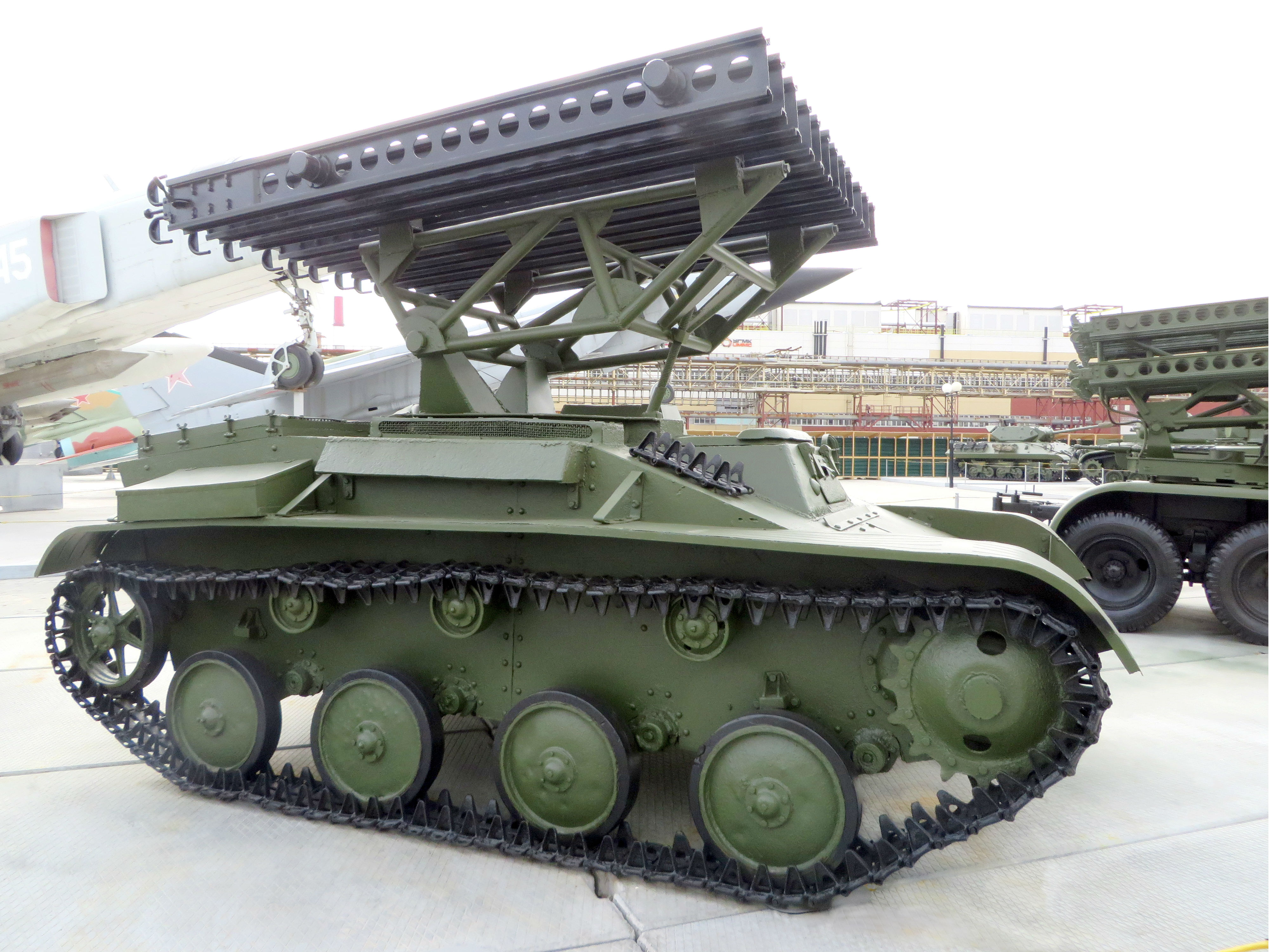 Макет. Боевая машина реактивной артиллерии обр. 1941 г.